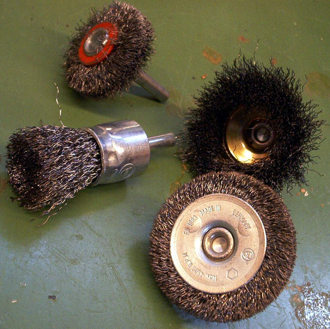 Staalbostels Roterend